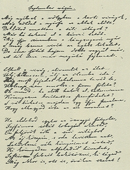 Petőfi Sándor Szeptember végén c. versének kézirata